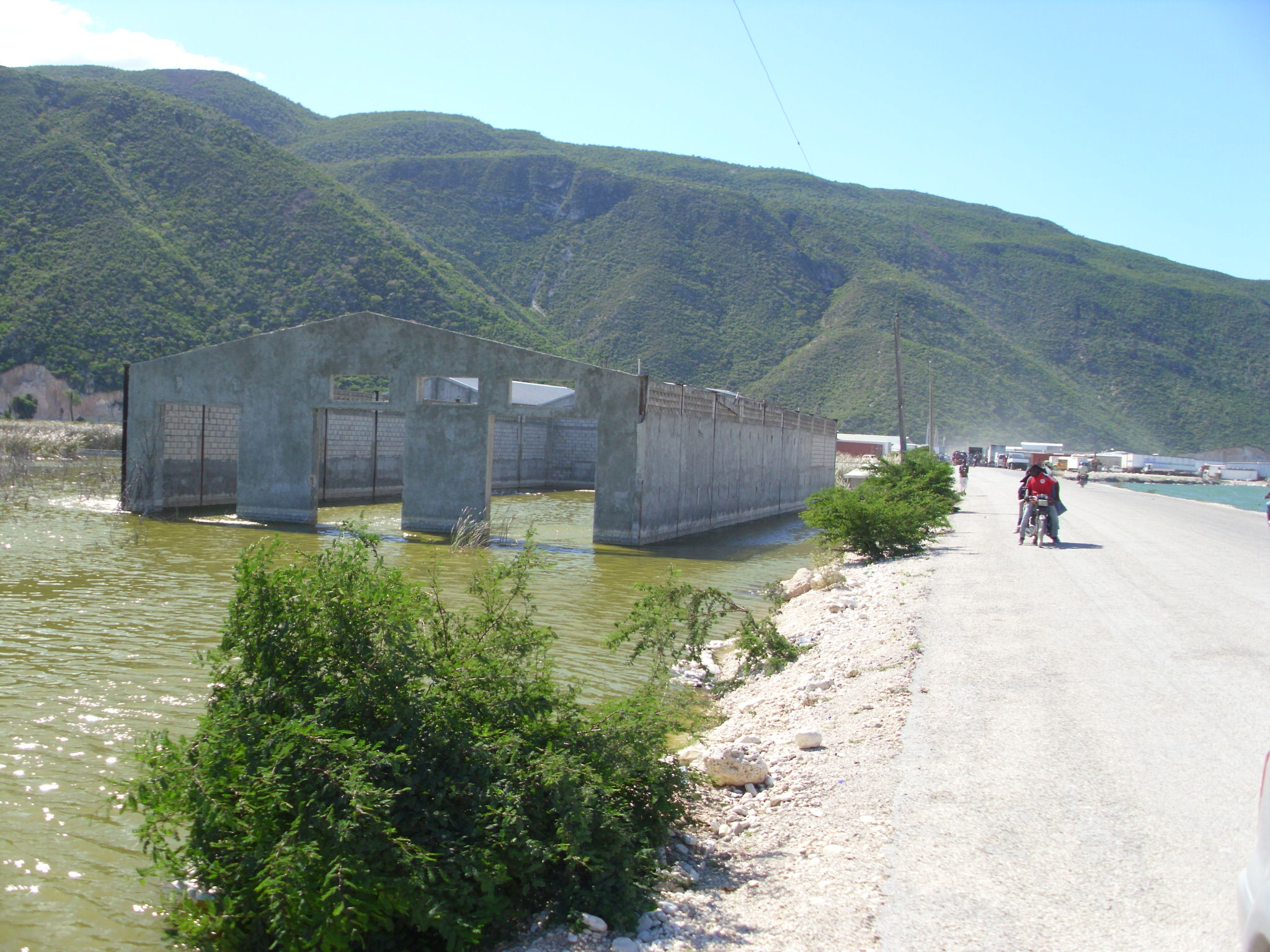 De verhoogde weg bij de nieuwe grenspost tussen Haïti en de Dominicaanse republiek bij Jimaní, door de verhoogde waterstand van het meer Étang Saumâtre.